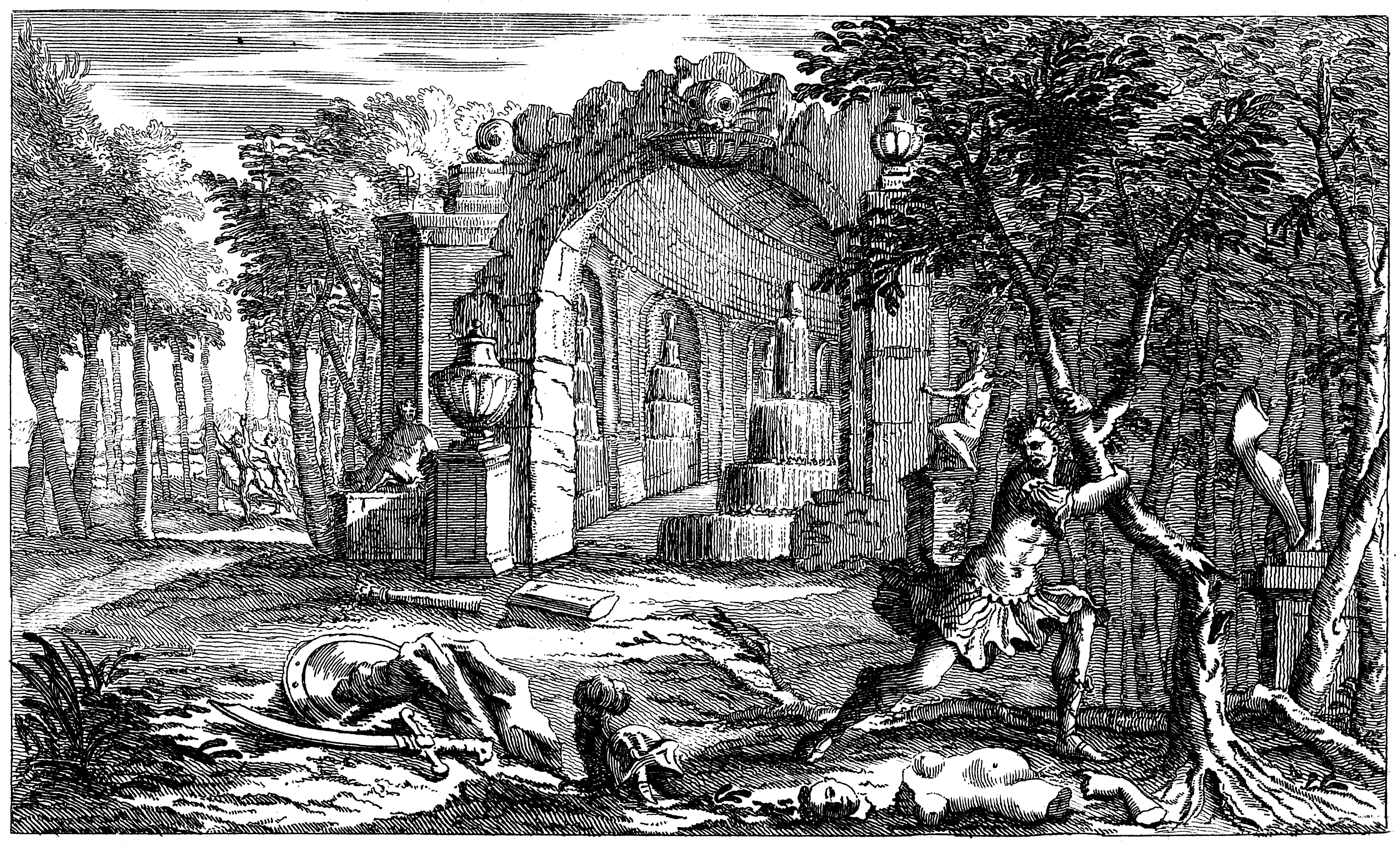 Jean-Baptiste Lully - Roland - Acte 4 - Une grotte au milieu d'un Bocage - Paris 1685